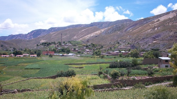 Vista general de la localidad de La Palca en el Departamento de Potosí